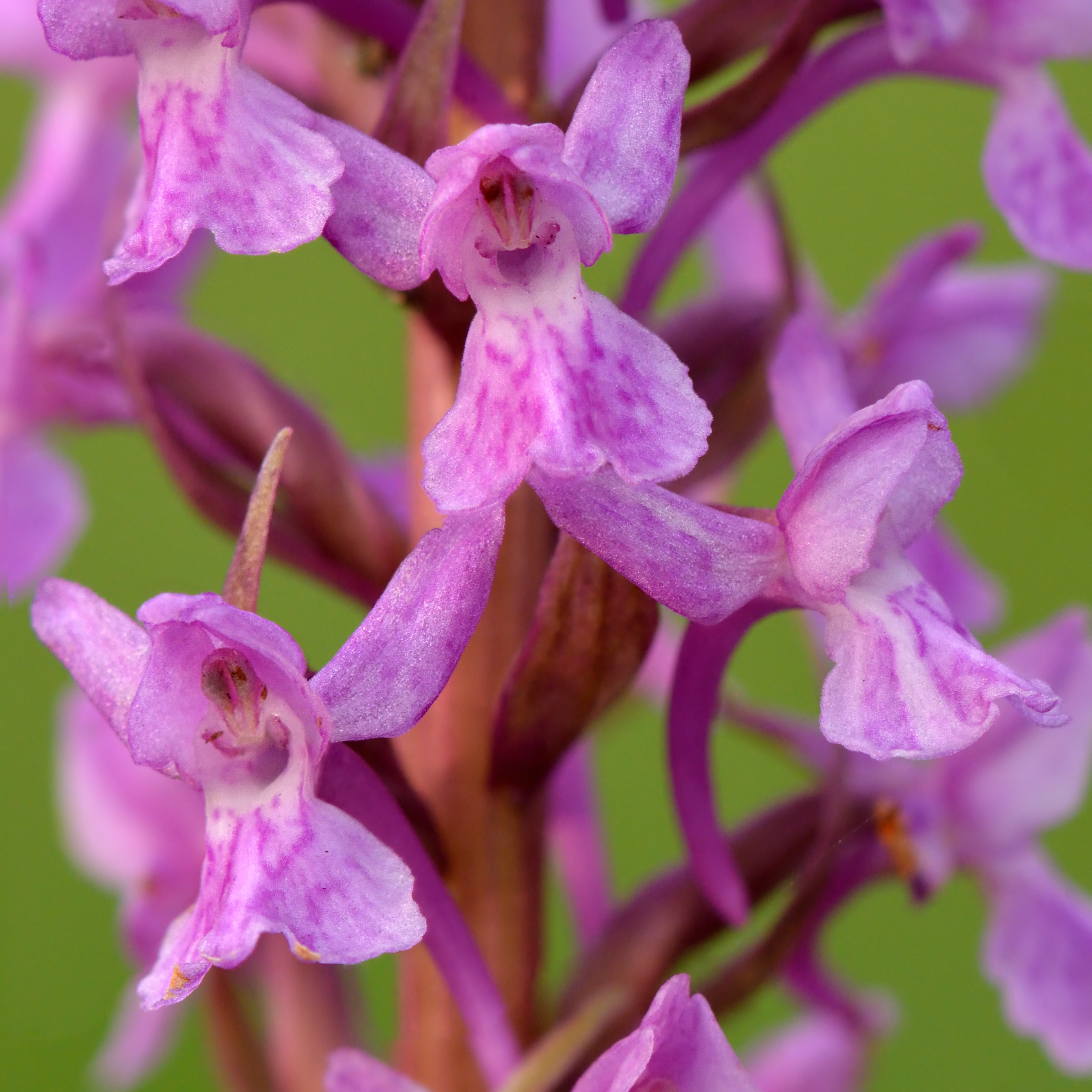 Käoraamatu ja sõrmkäpa hübriid. Niitvälja soo, Loode-Eesti.